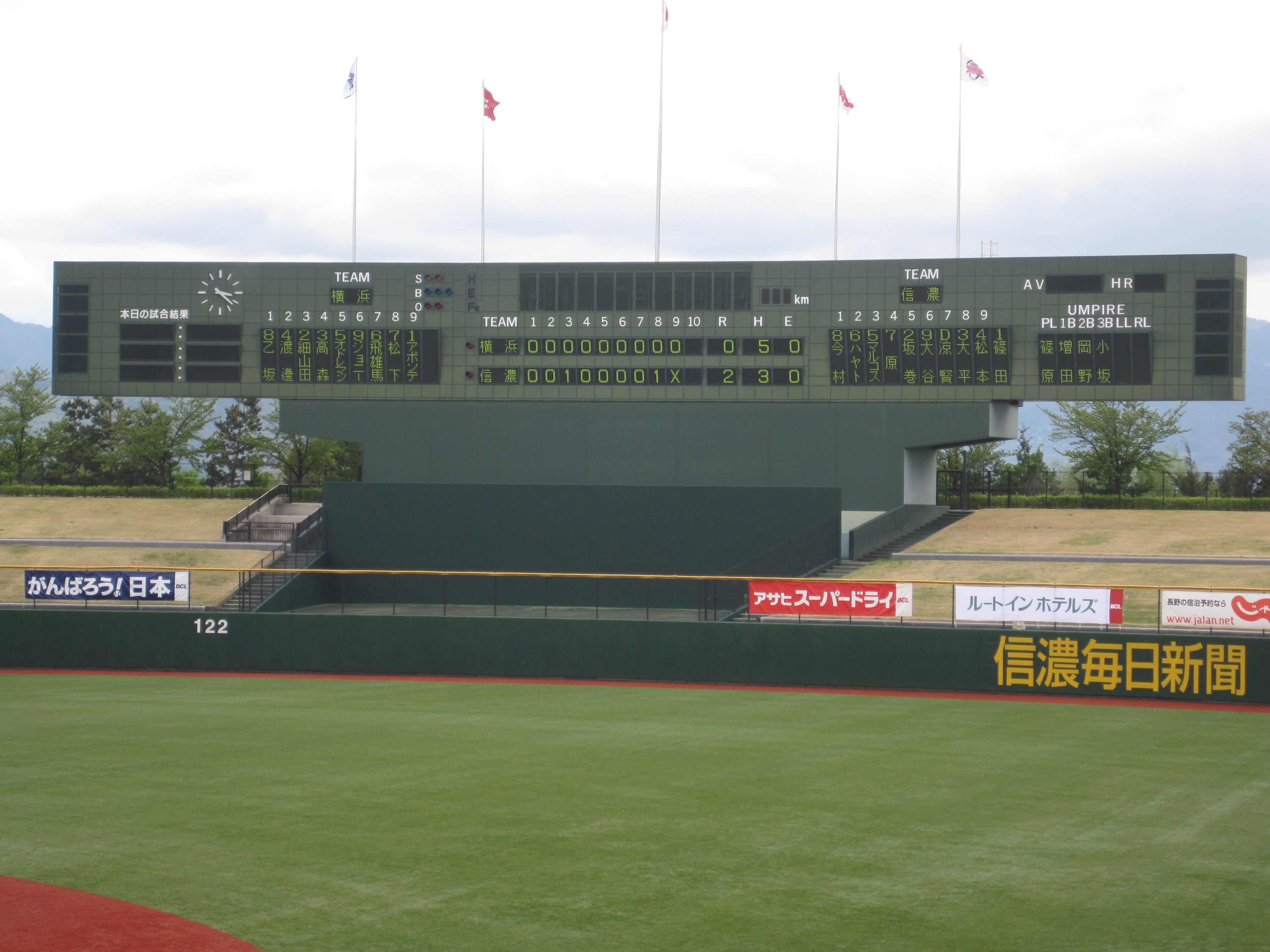 2012年5月4日撮影。